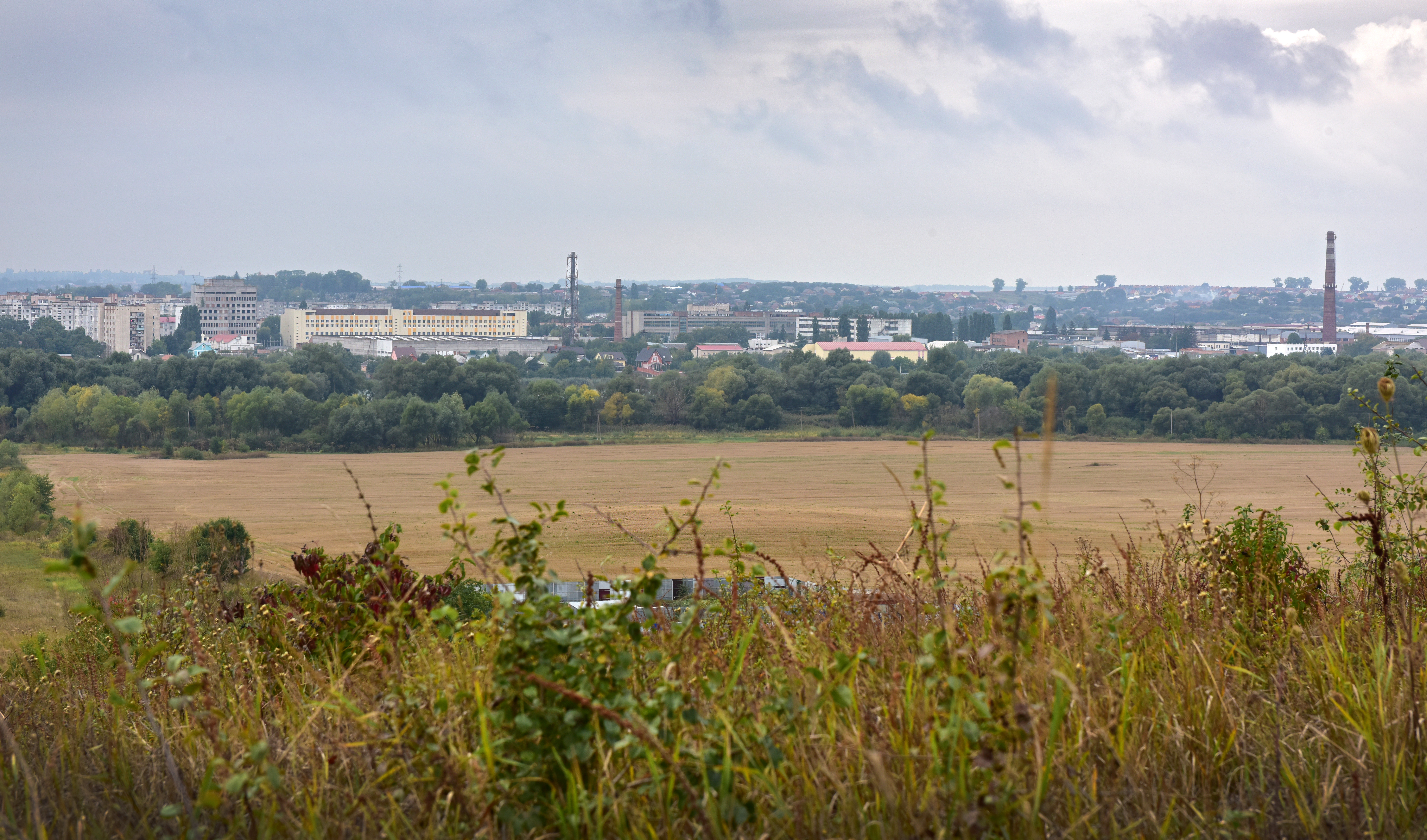 Поселення, Хмельницький, станція Гречани